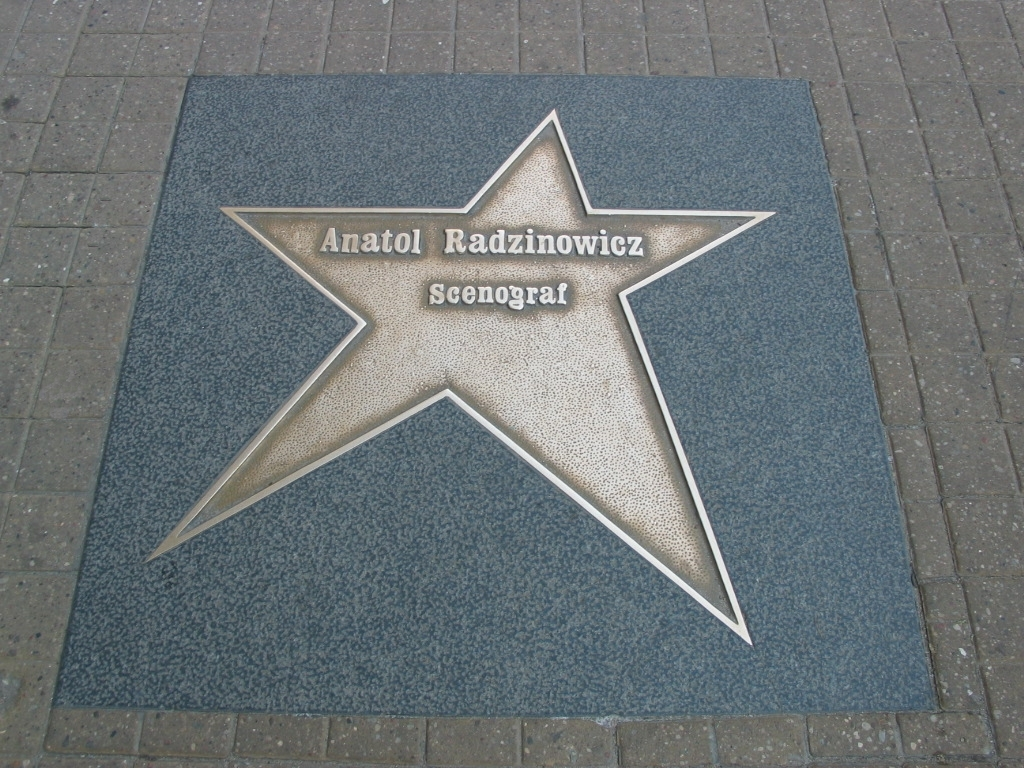 Łódź Walk of Fame - scenograf Anatol Radzinowicz.